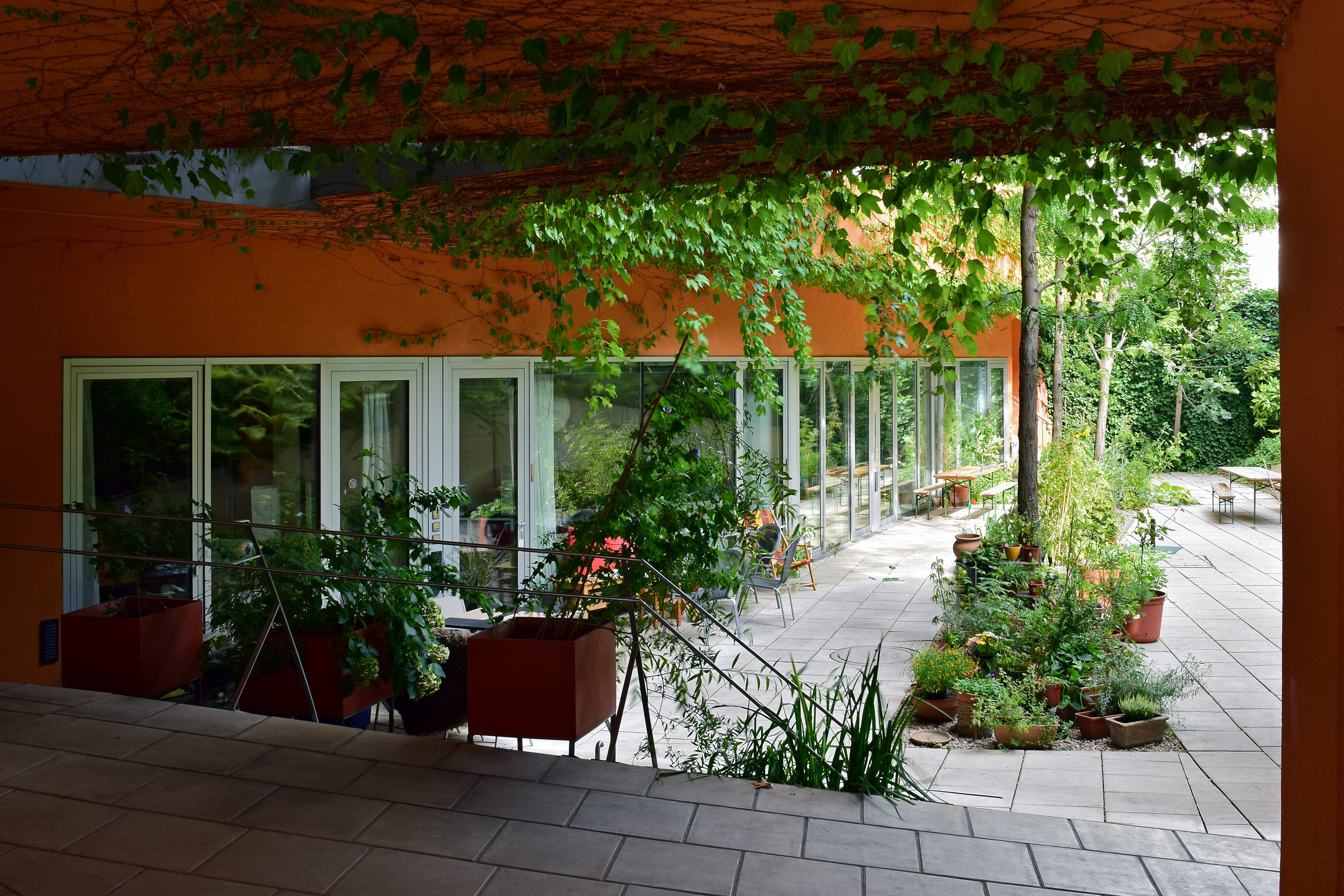 In der ehemaligen Sargfabrik in Wien-Penzing verwirklichte der Verein für Integrative Lebensgestaltung im Jahr 1996 ein Wohn- und Kulturprojekt. Darin befinden sich neben Wohnungen ein Kulturhaus, ein Badehaus, ein Seminarraum, ein Kinderhaus und ein Café-Restaurant. Die Miss Sargfabrik ist eine Erweiterung des Projektes in der Missindorfstraße (daher der Name). Näheres in diesem PDF.